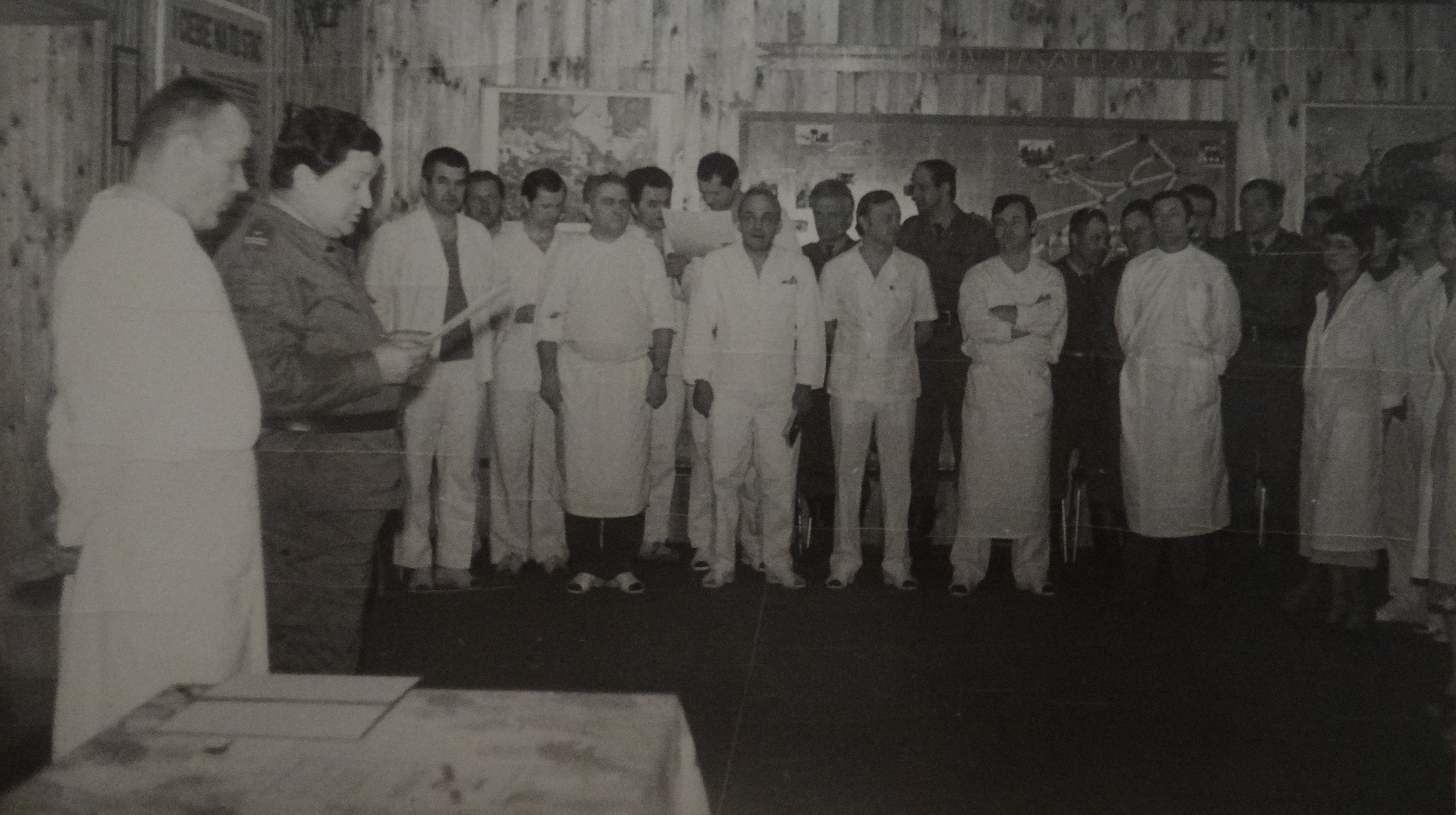 Kadra dowódcza i lekarska 45 Batalionu Medycznego